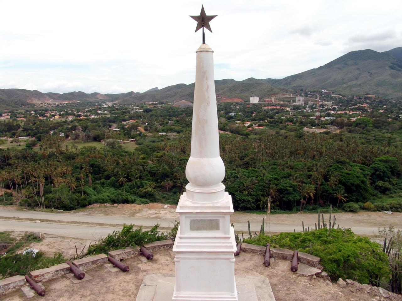 Cerro en donde se llevo a cabo la famosa batalla de Matasiete, en Nueva Esparta, Venezuela